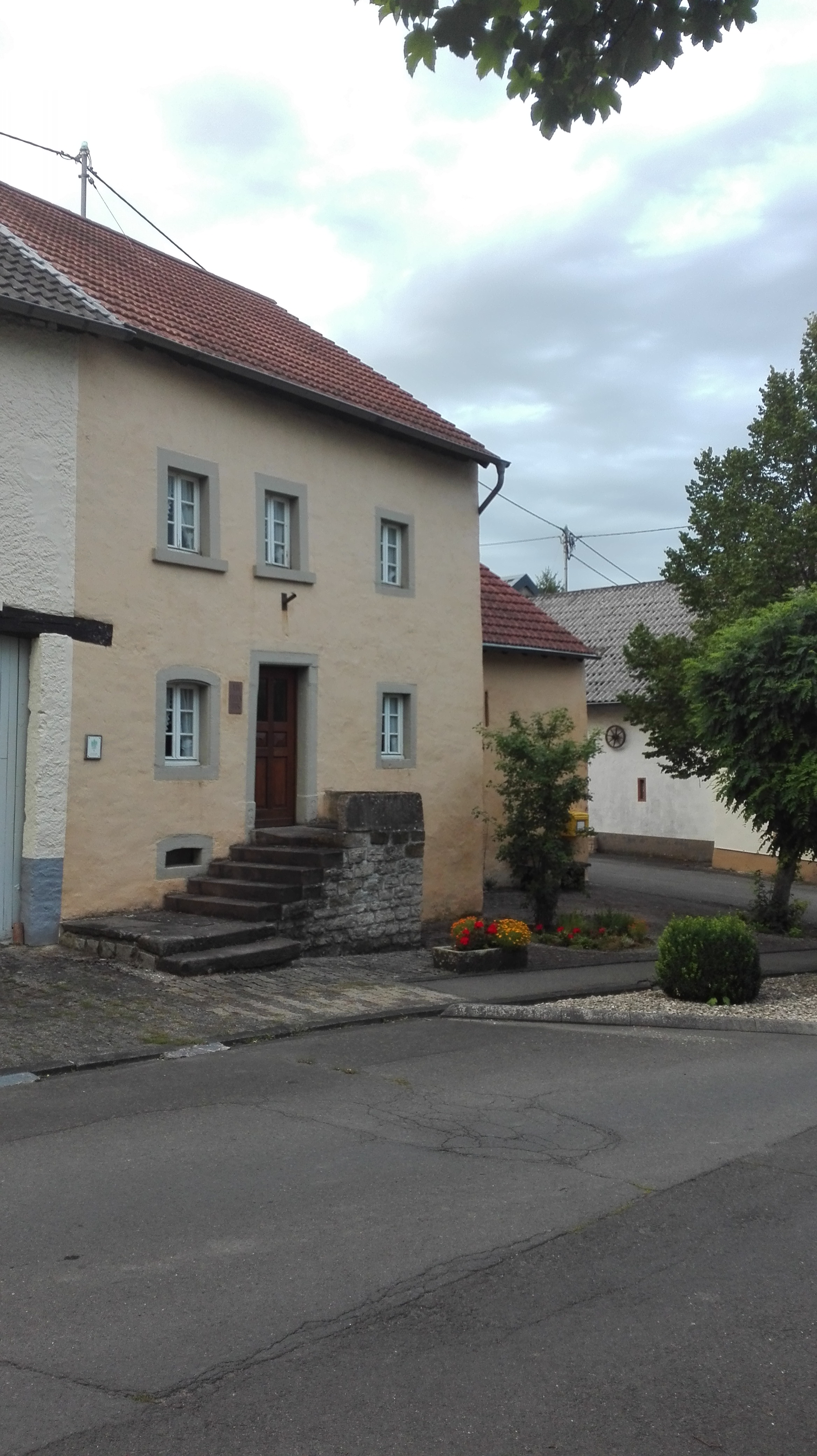 Leikshaus in der Kirchstraße Fließem. Die OG des Eifel-Vereins hat in diesem Gebäude ein Heimatmuseum errichtet.